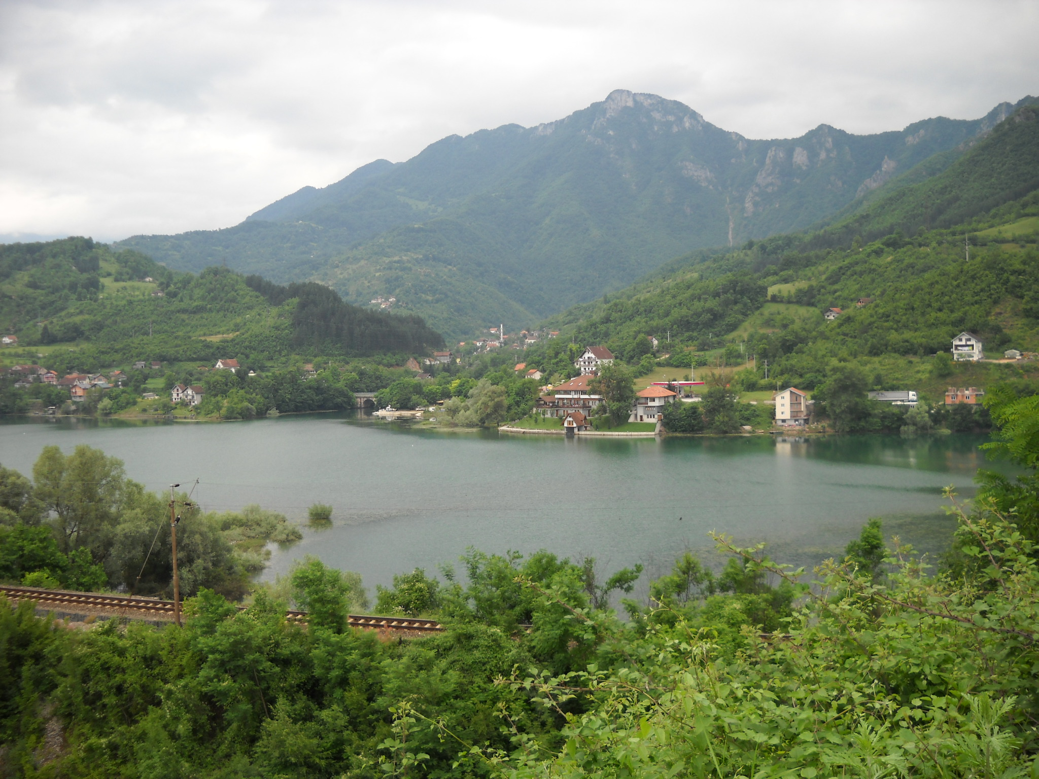 Orahovica Konjic